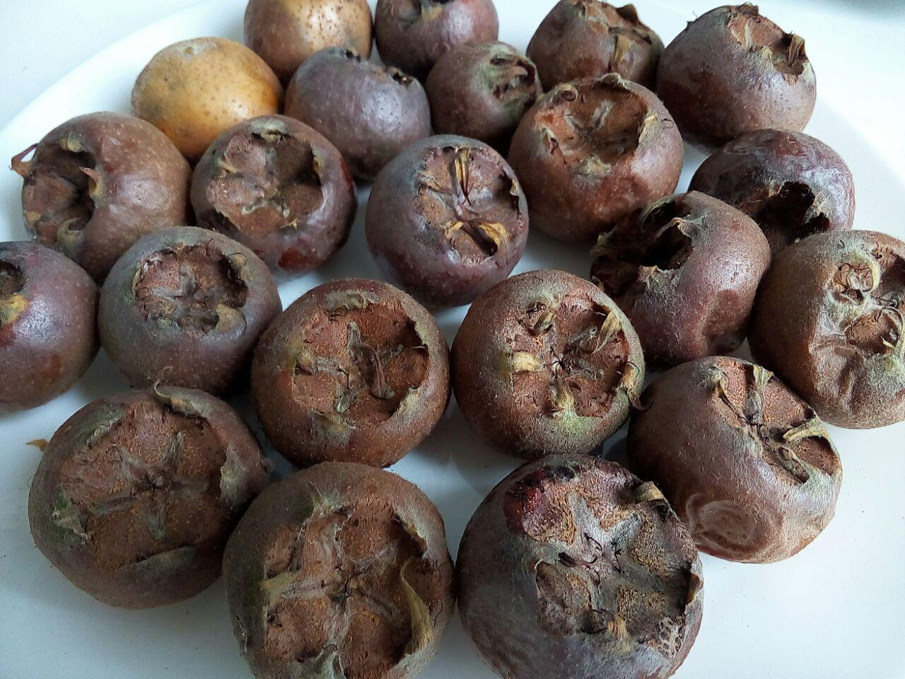 Frutu comestible